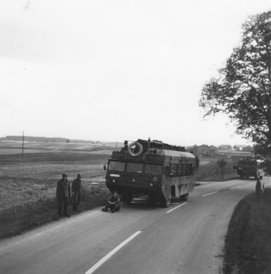 Schwimmschnellbrücke M2B Alligator bei Merklingen